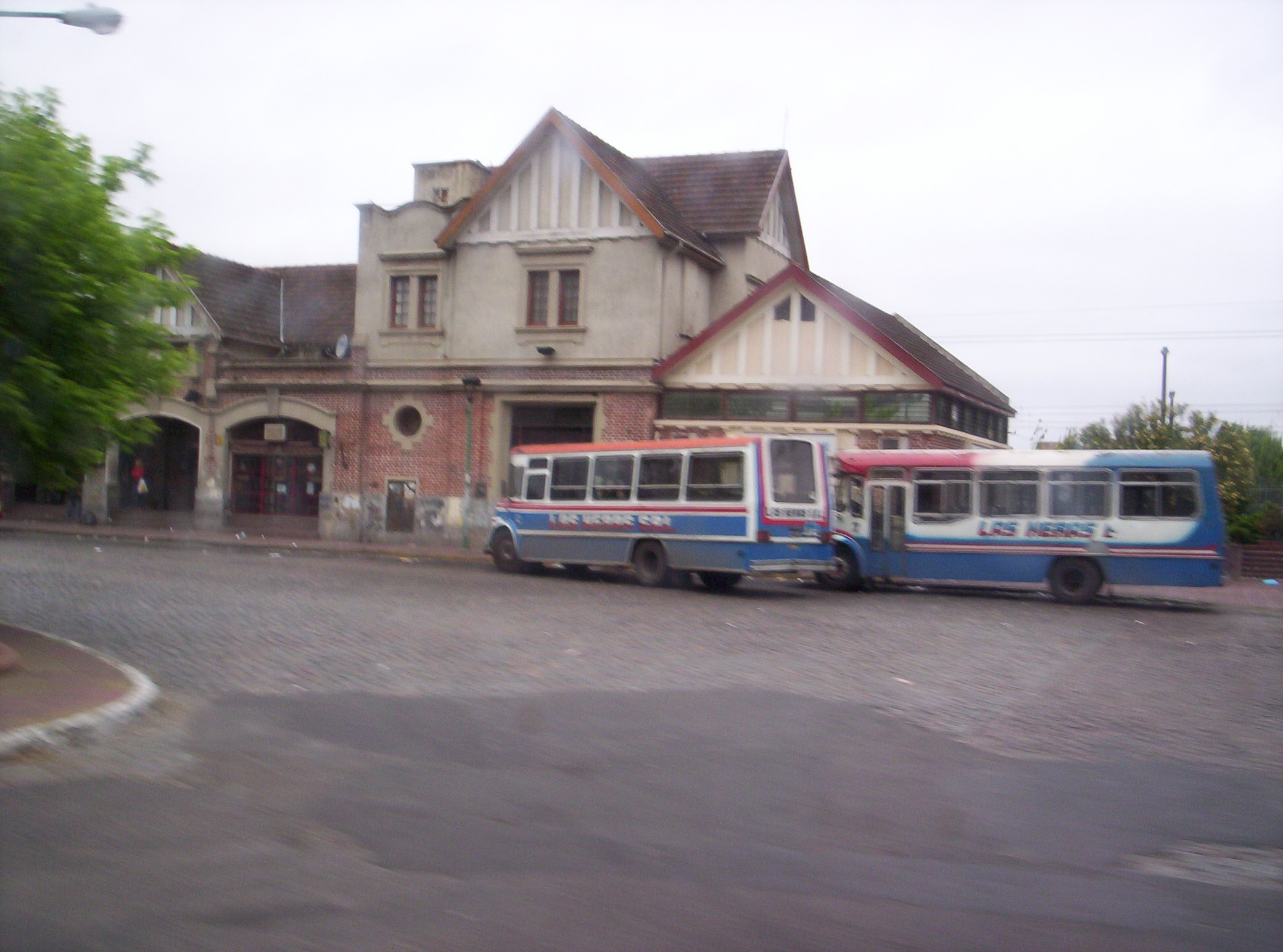 Estación Banfield del Ferrocarril General Roca, Buenos Aires, Argentina.